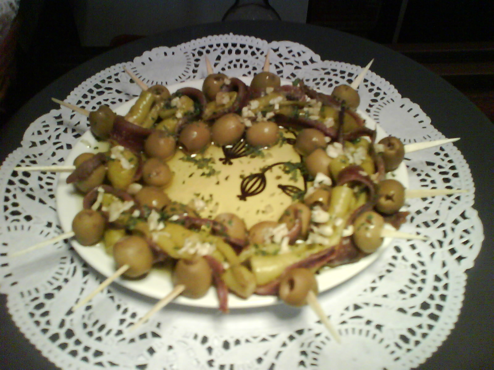 Plato de pinchos de gildas.